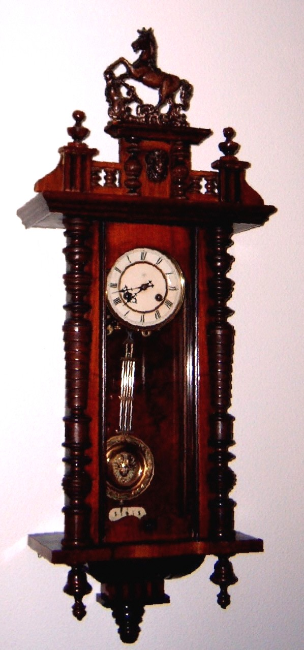 Een zgn. paardjesklok. Eigen opname.